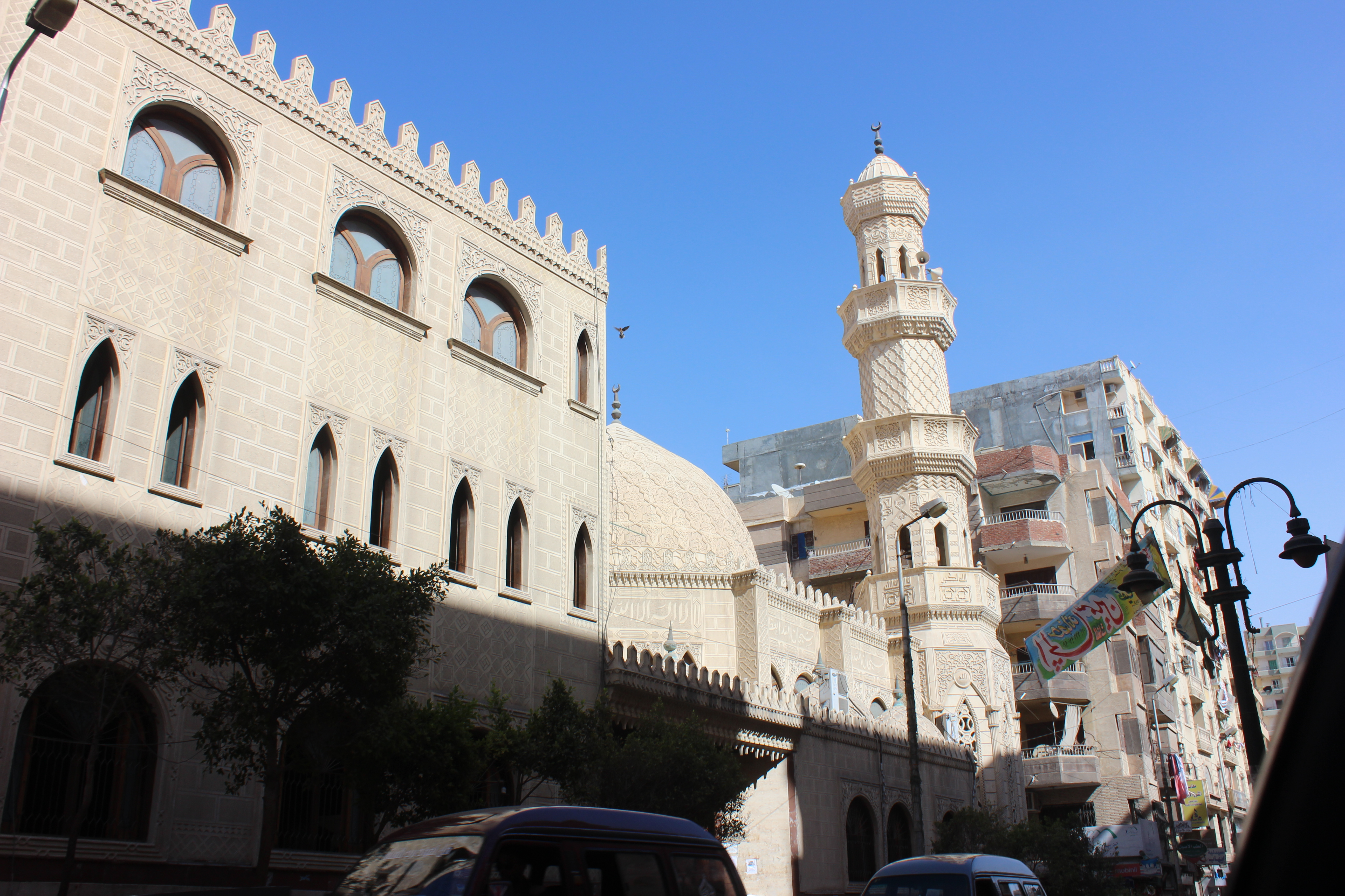 مئذنة أحد المساجد بالعجمي.